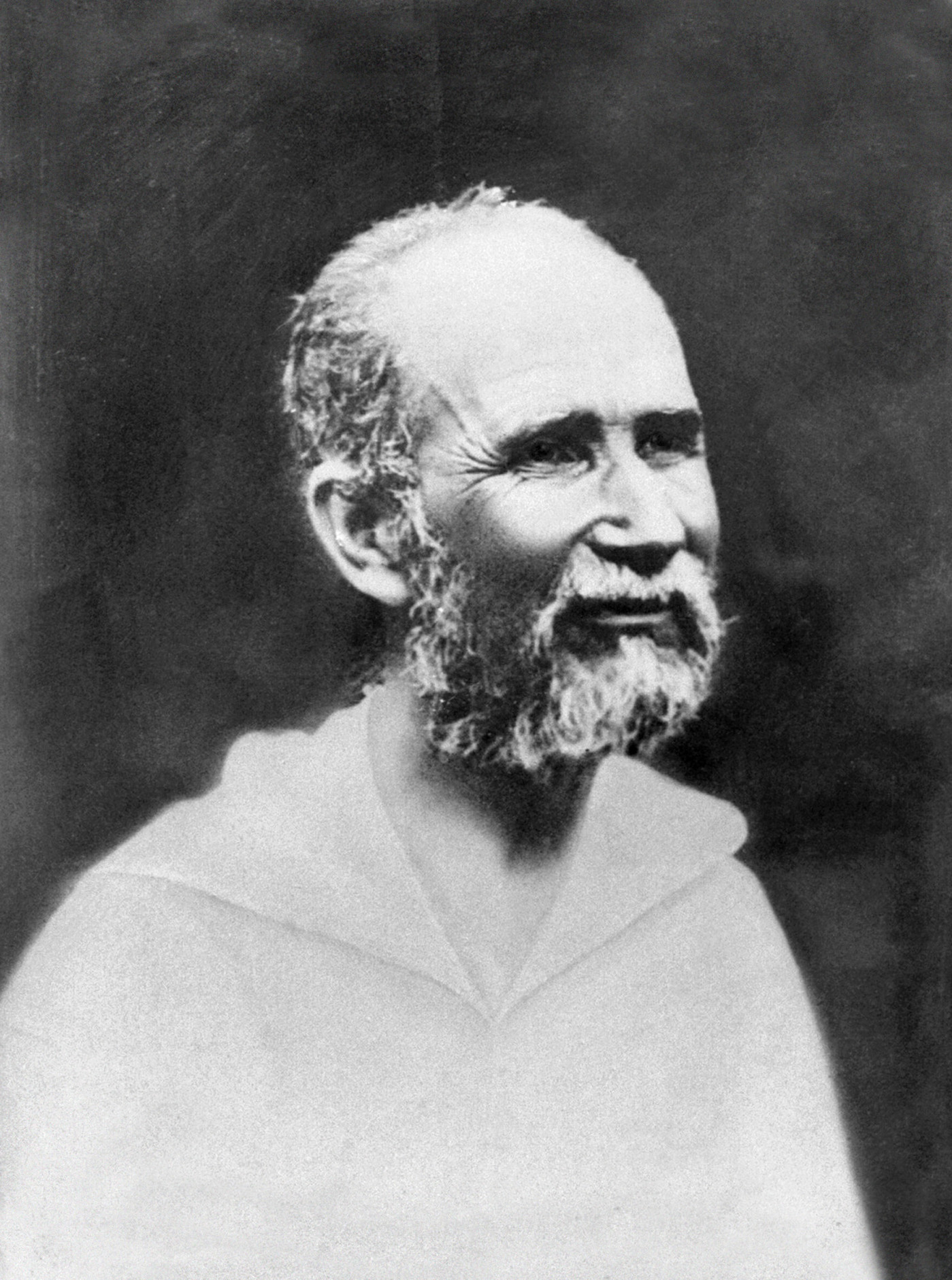 Dernière photo de Charles de Foucauld, à Tamanrasset